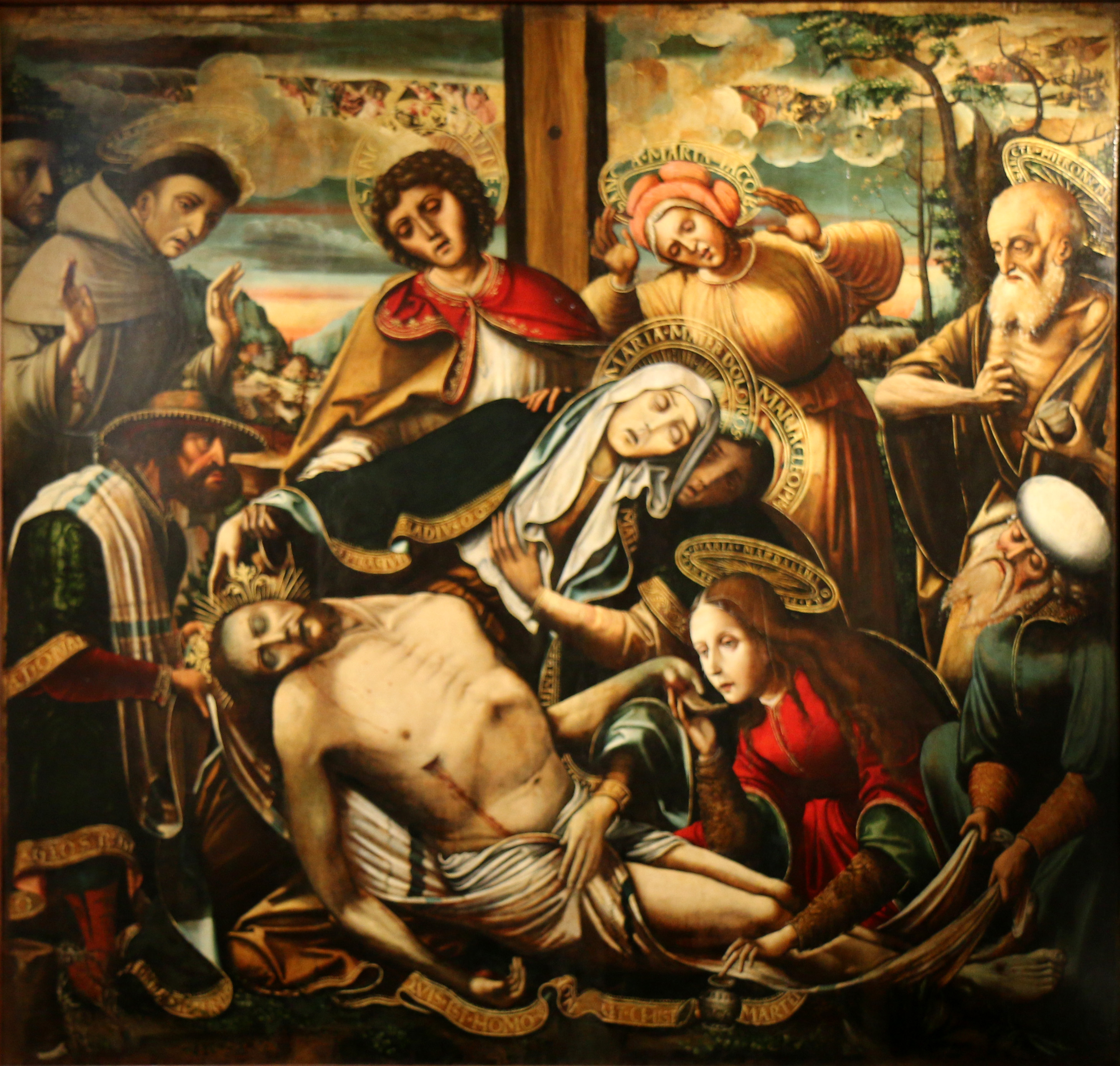 Pietà d' Etienne Peson datant de 1515 au Musée d'histoire de Marseille.